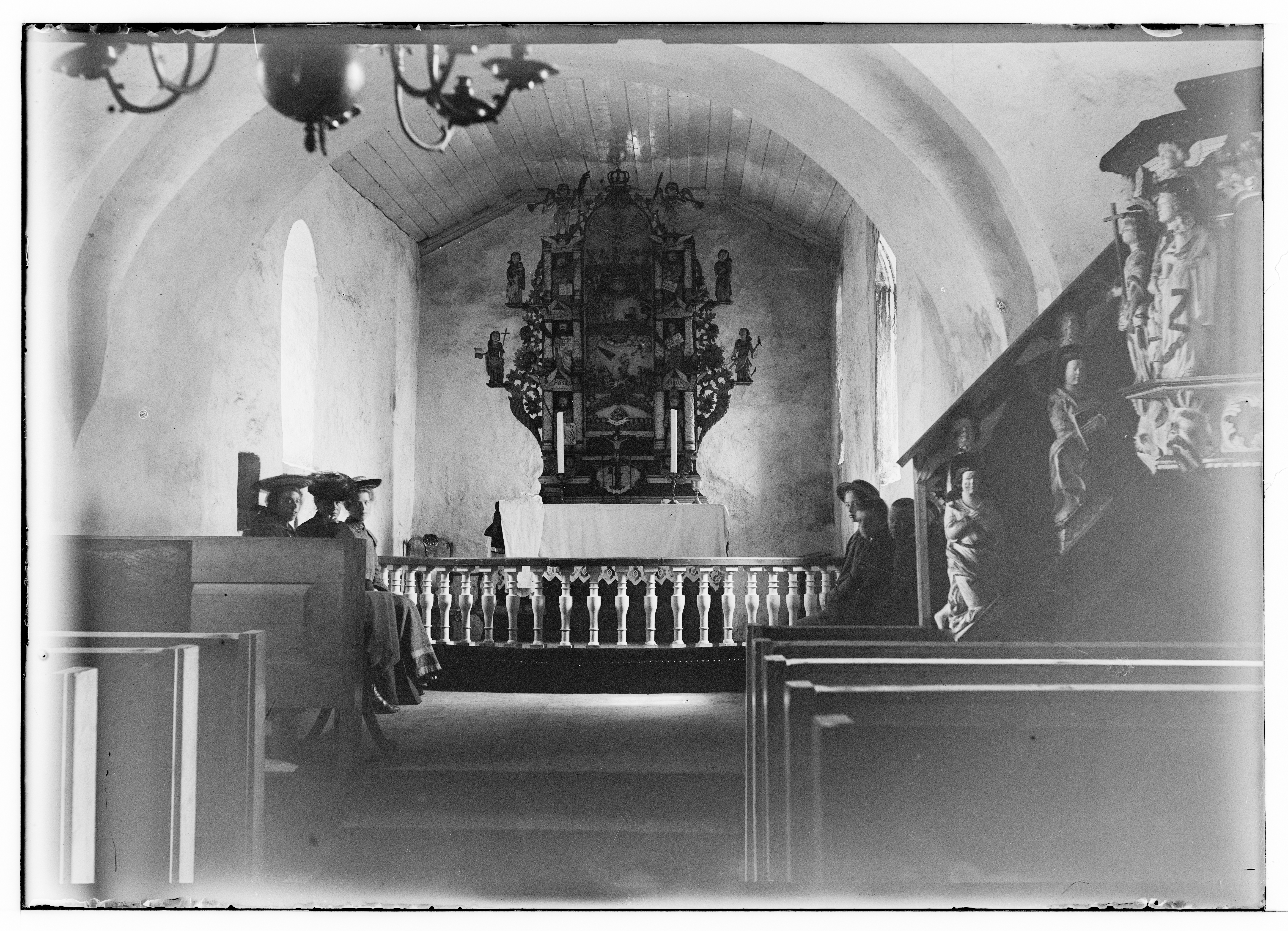 Bildet er hentet fra Arkivverket. Giske kapell, interiør, Giske, Romsdals amt Arkivinstitusjon : Riksarkivet Arkivnavn : Havnedirektoratet Sted : Norge, Møre og Romsdal, Giske, Emneord: Kyst Avbildet